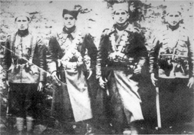 Srpskohrvatski / српскохрватски: Grupa boraca Ariljske čete Užičkog partizanskog odreda 1941.